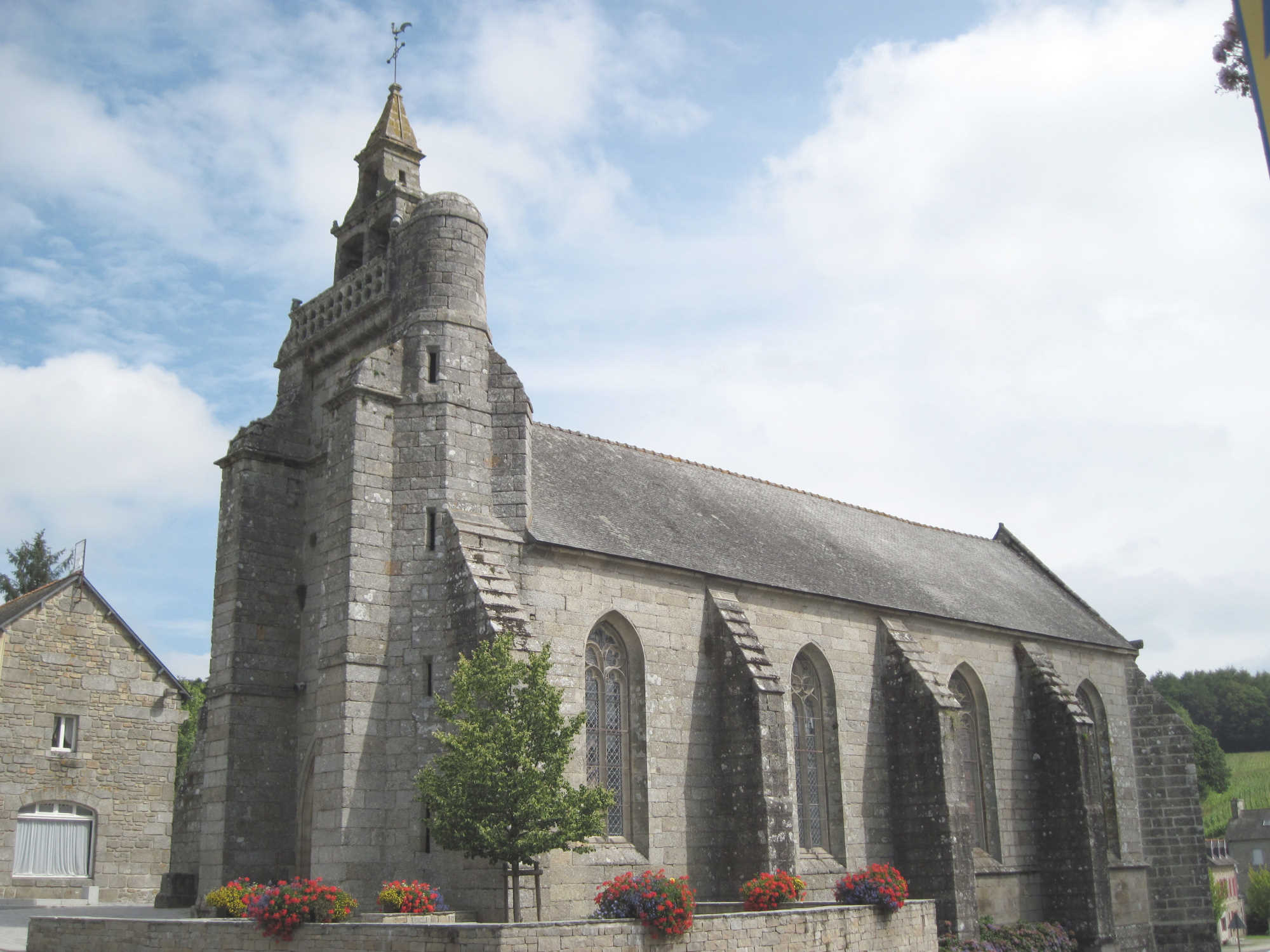 Saint Nicolas Du Pélem - Eglise vue de droite